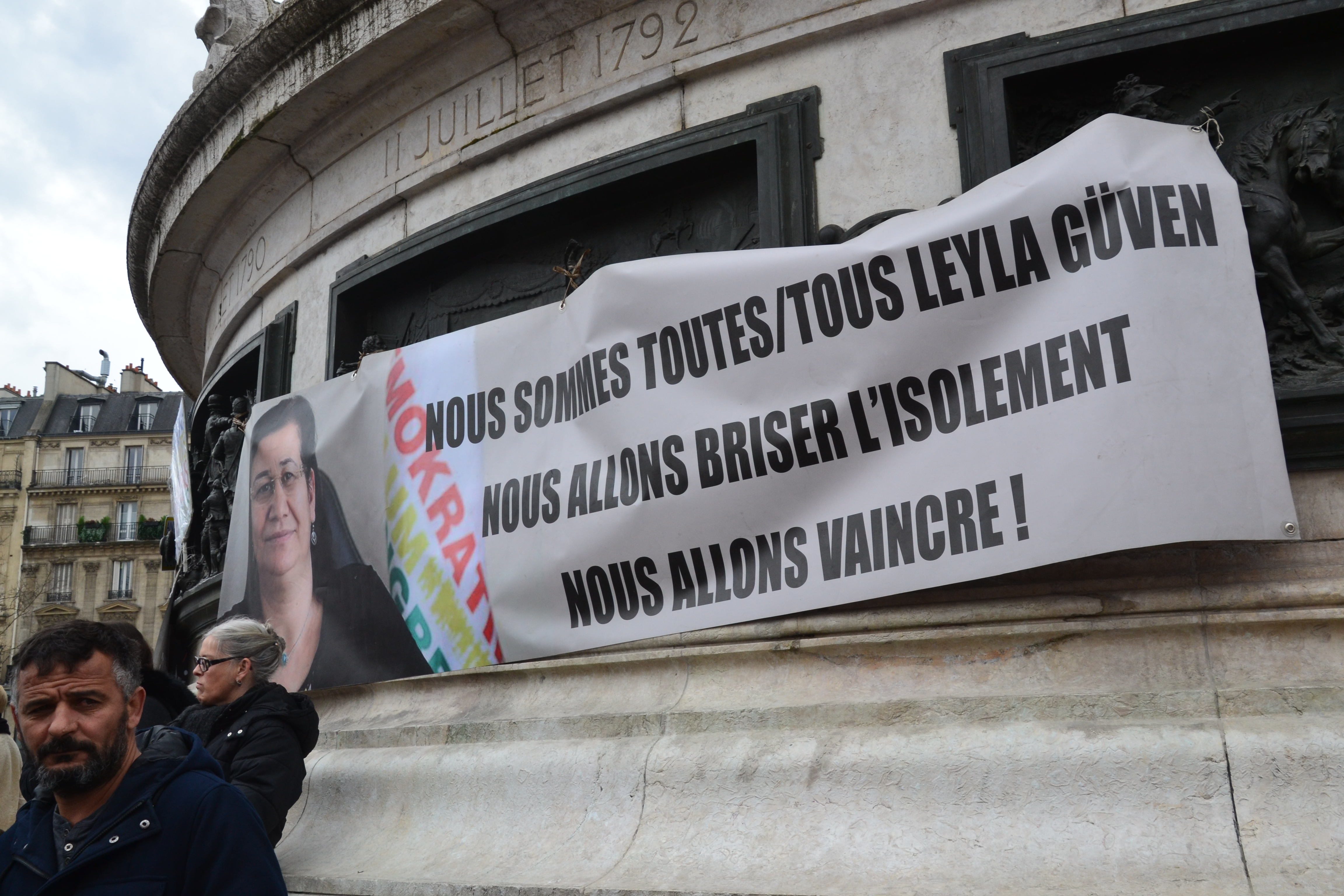 Rassemblement droit des femmes Leyla Guven est une députée Kurde en Turquie, emprisonnée par le pouvoir turc, qui fait une grève de la faim pour demander la libération du leader du PKK Ocalan